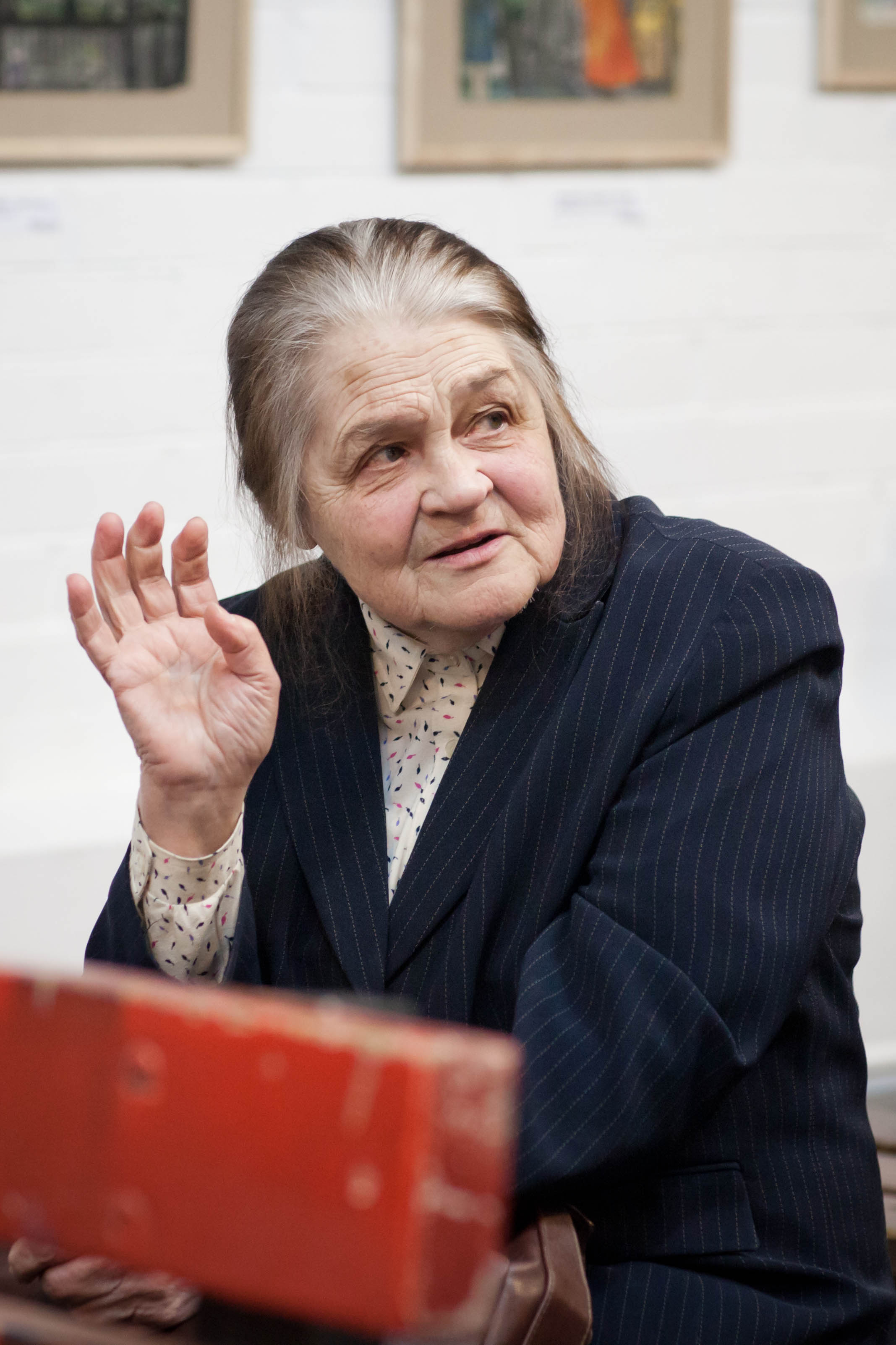 Мария Александровна Реформатская (род. 1938) — советский и российский историк искусства, кандидат искусствоведения, старший преподаватель кафедры всеобщей истории искусства Исторического факультета МГУ; автор работ по древнерусскому искусству и истории московской интеллигенции первой половины XX века. Дувакинский вечер (110 лет со дня рождения) в Зверевском центре современного искусства ("Устная история").